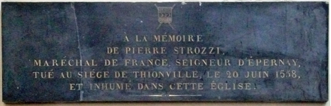 Plaque en la mémoire de Pierre_Strozzi_seigneur_d'Epernay_qui se trouve en l'église_ND.